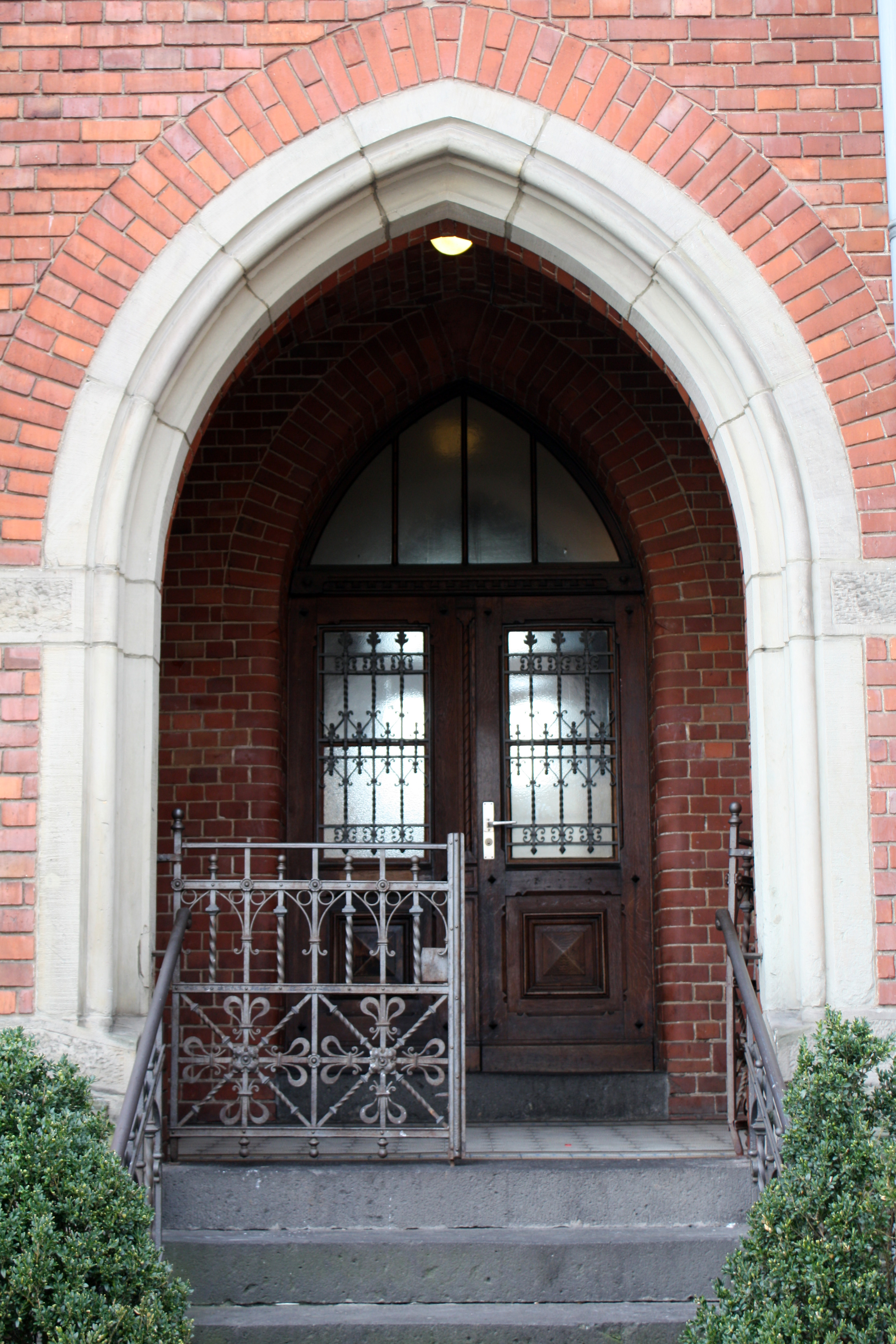 Lechenich Markt, Eingang des neugotischen Amtsgerichtes von 1890